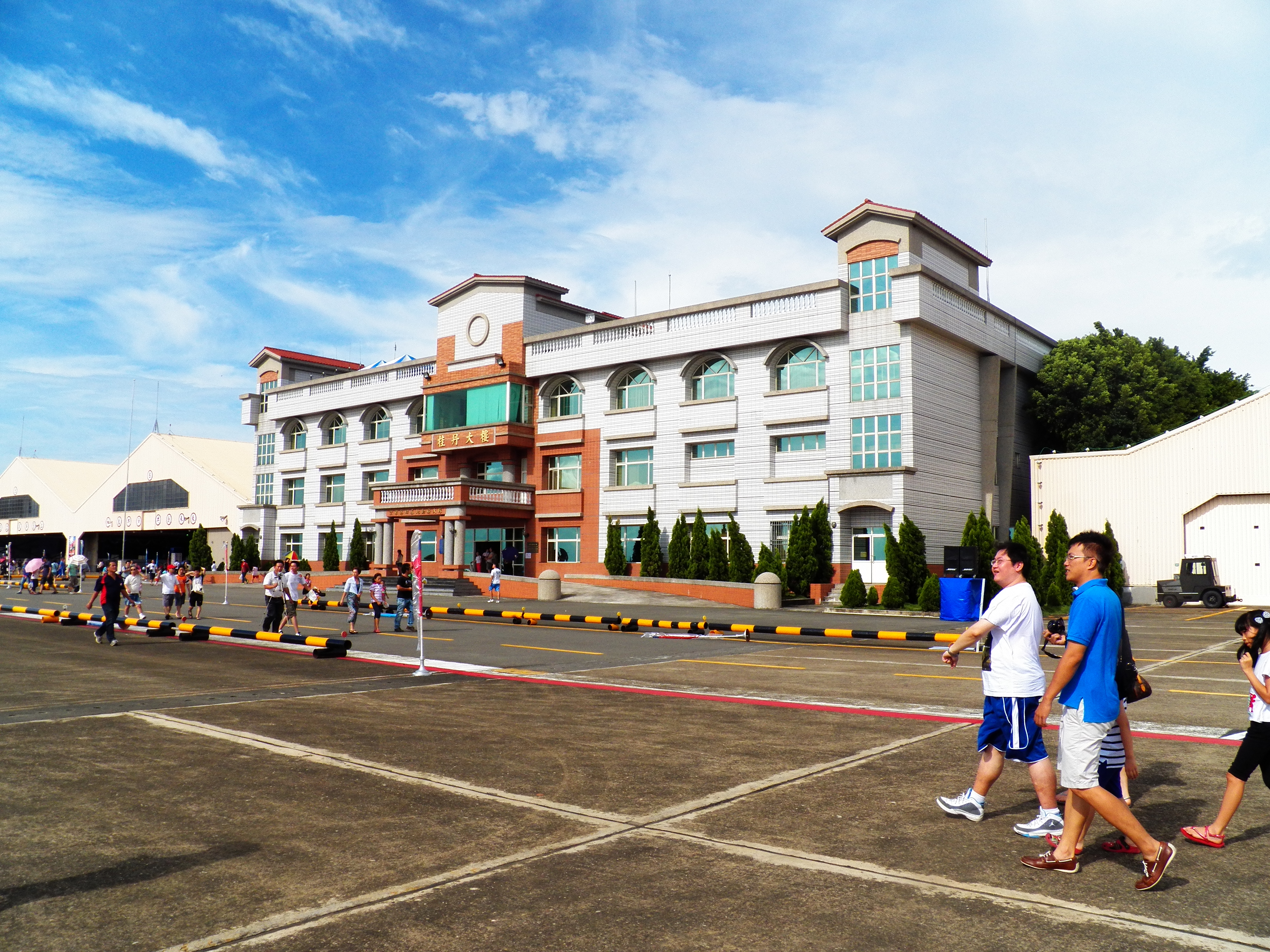 空軍嘉義基地桂丹大樓，2005年9月10日竣工，紀念抗戰中民國27年（1938）2月18日武漢空戰中殉國的第四大隊代理大隊長李桂丹上尉。